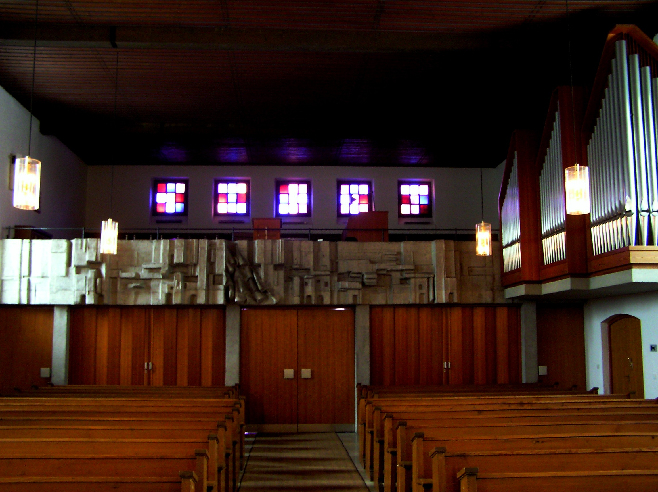 Blick in Richtung Empore und Orgel der Lutherkirche in Nürnberg.